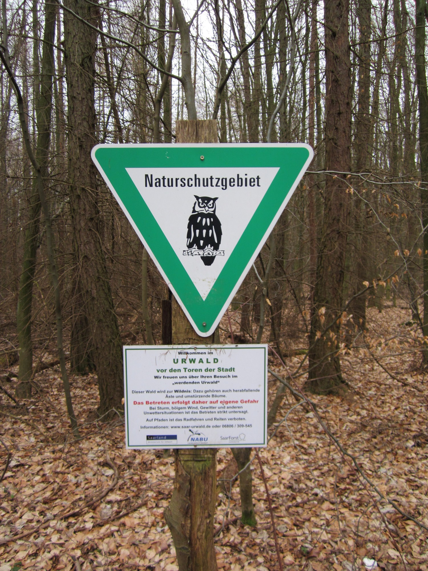 Steinbachtal (Saarbrücken)